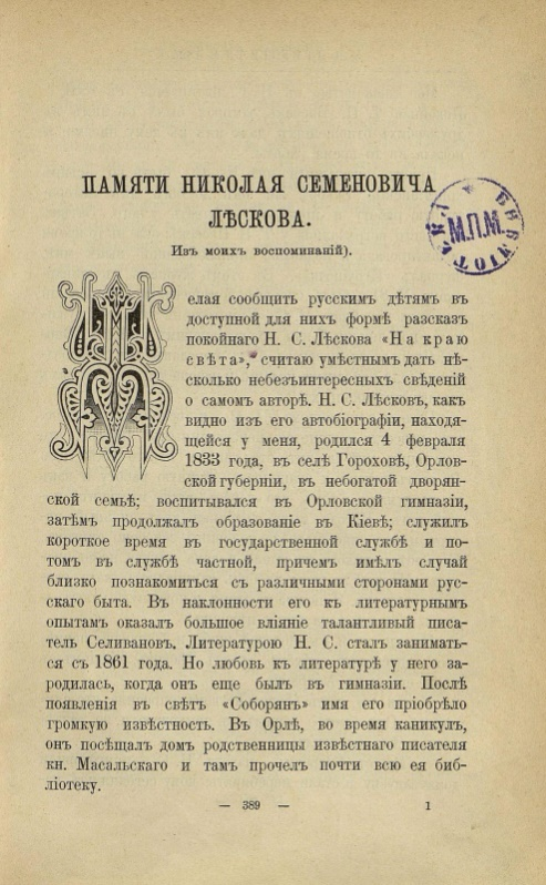 А. Н. Пешкова-Толиверова, Некролог Н. С. Лескову в журнале "Игрушечка", сентябрь 1895 г.